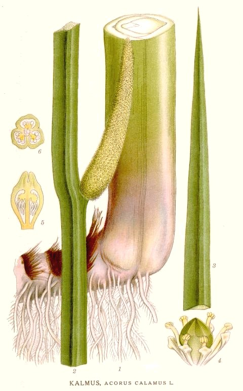 Acorus calamus L. Original Description Kalmus, Acorus calamus L.